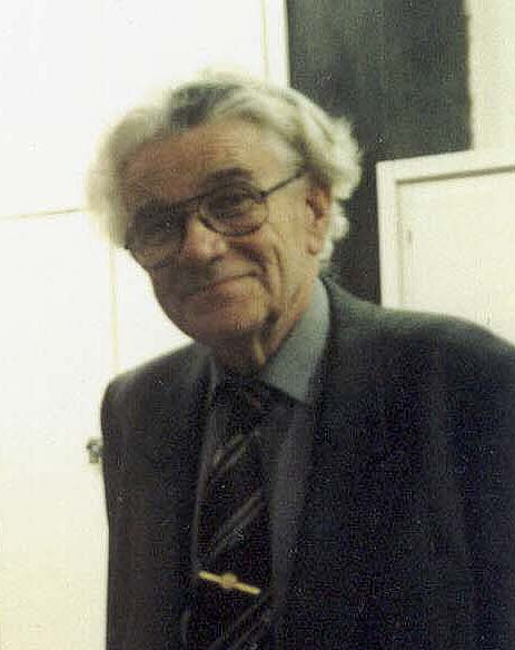 László Kákosy, Hungarian Egyptologist (1932–2003)